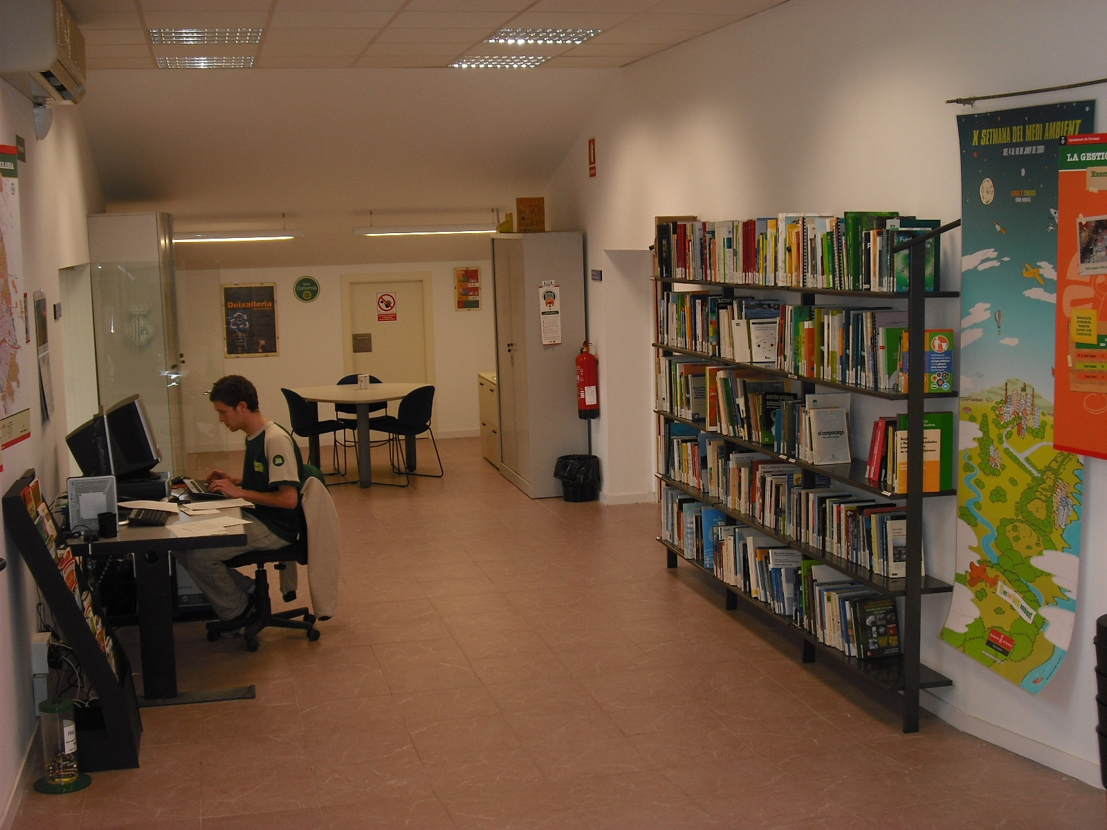 El Centre de Documentació del Parc Natural està gestionat pel Centre de Documentació i Educació Ambiental per mitjà d'un conveni de col.laboració entre l'Ajuntament de Terrassa i la Diputació de Barcelona.